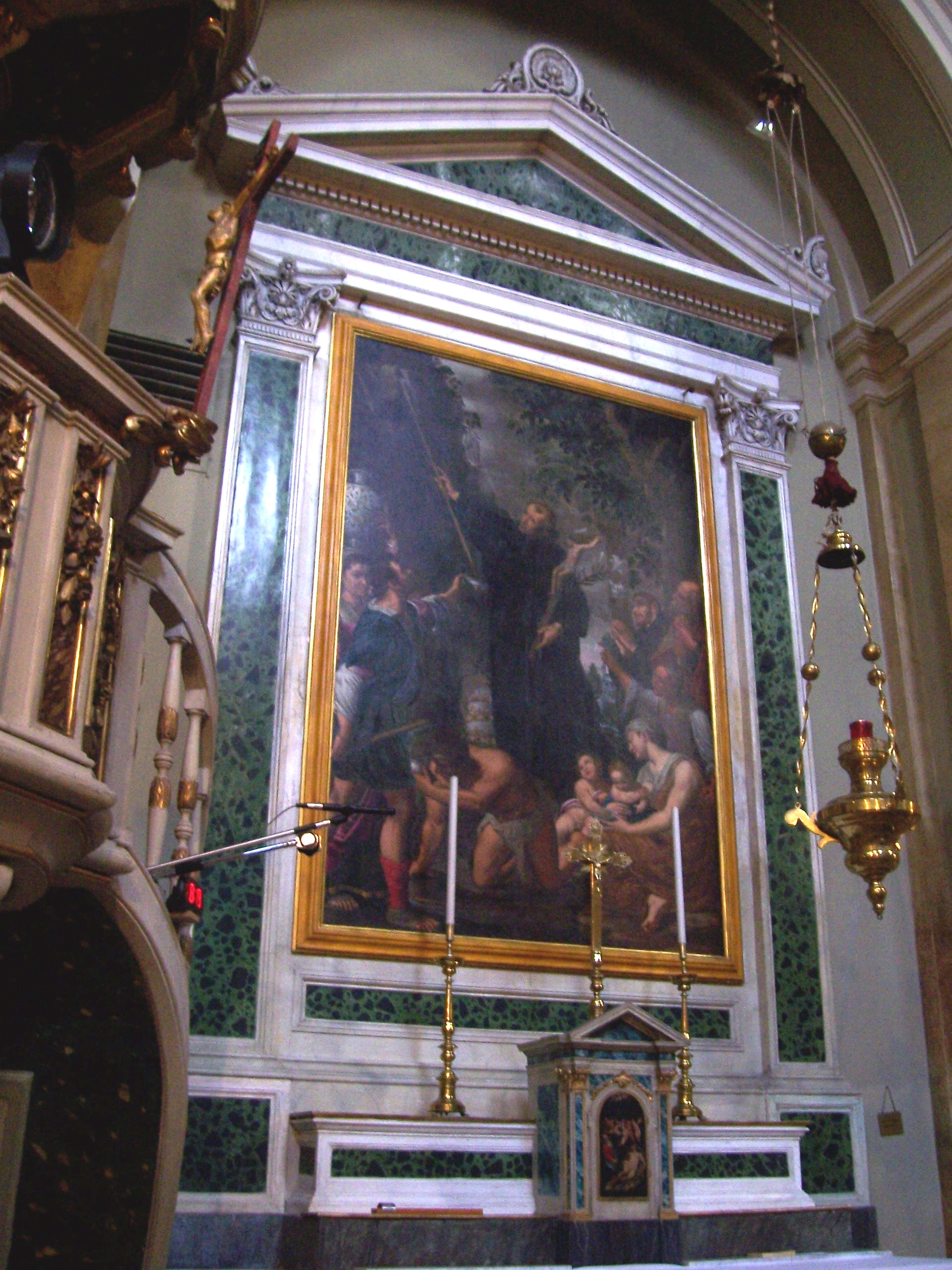 sant'alessandro (brescia) grazio cossali.jpg